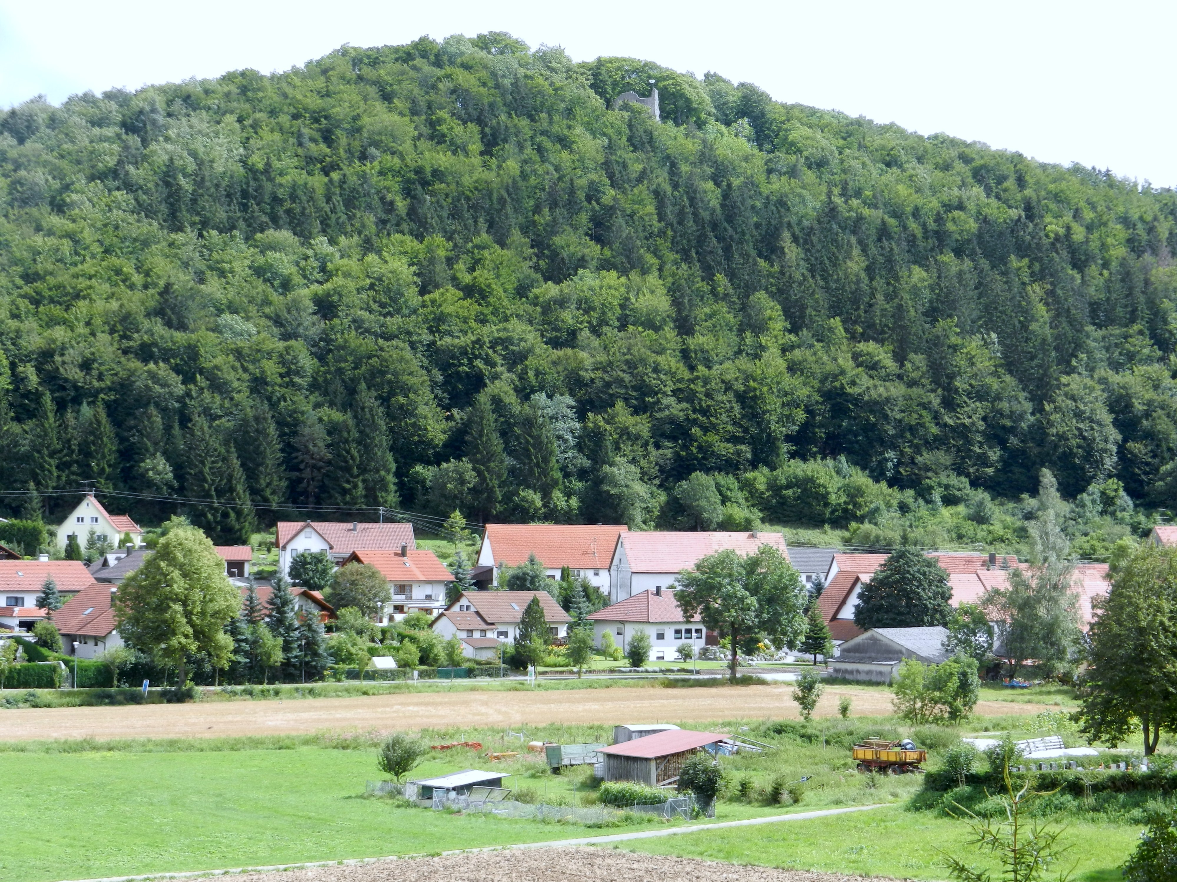 Ruine Stetten bei Stetten unter Holstein, Ortsteil von Burladingen